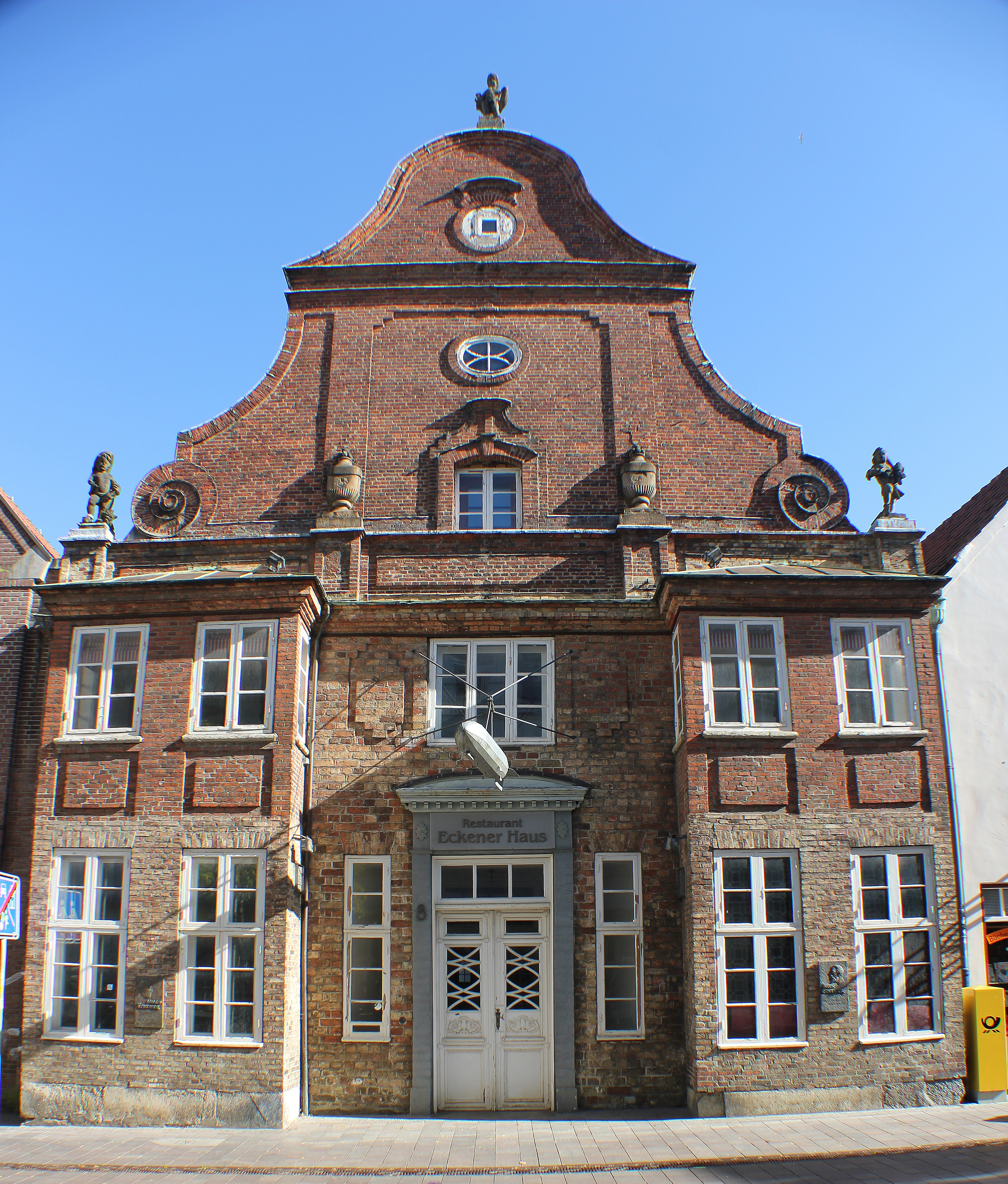 Eckener Haus (Vorderansicht), viertes Bild